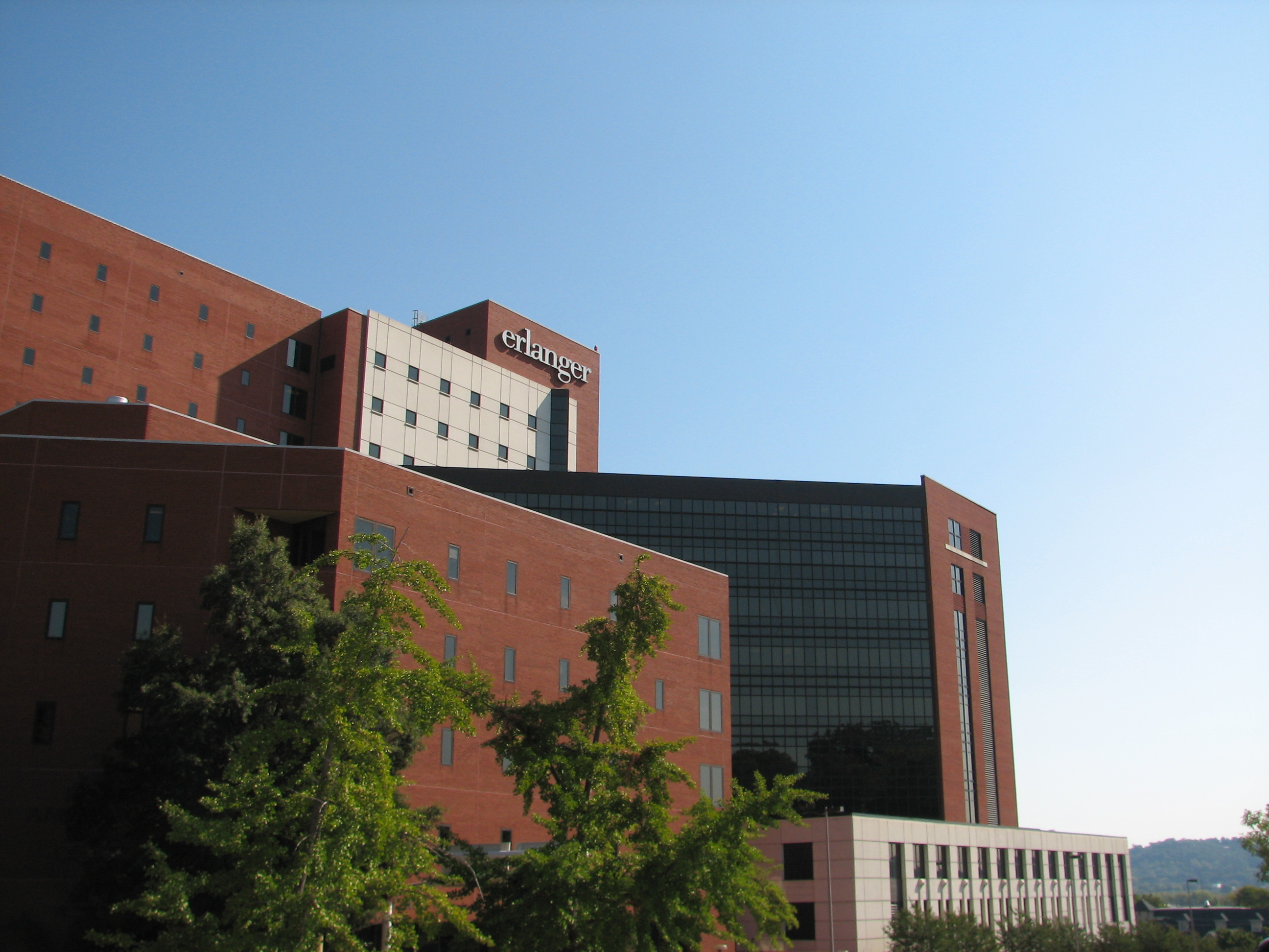 Erlanger Baroness Campus